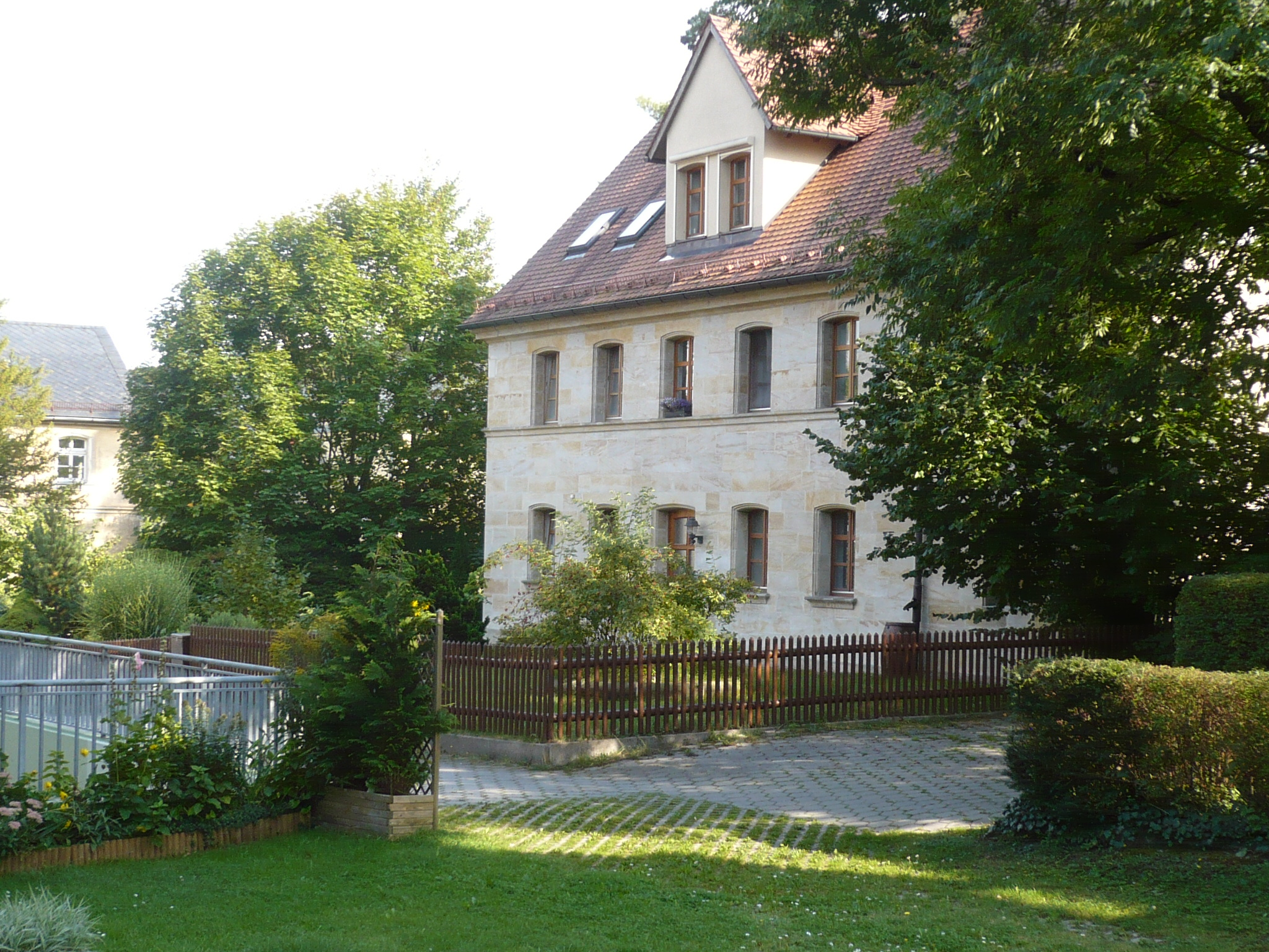 Moritzhöfen 10 Bayreuth